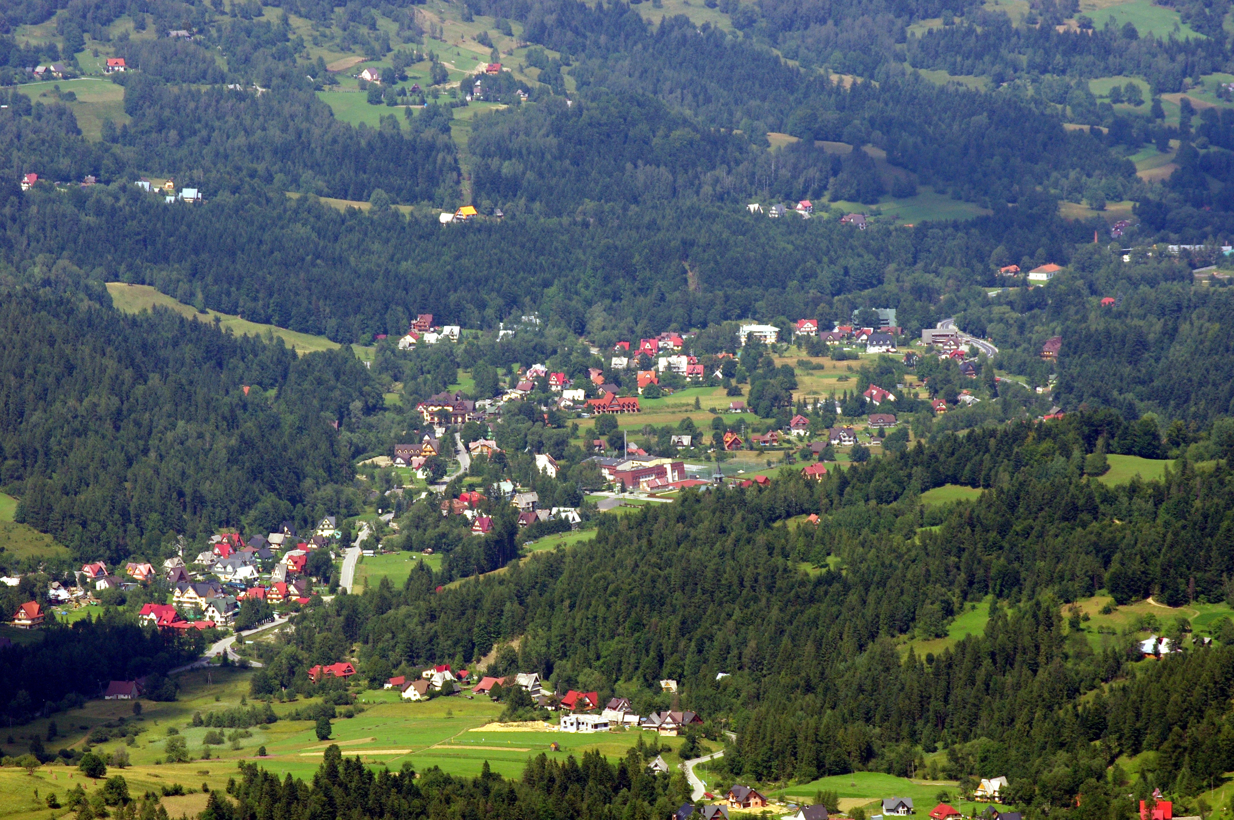 029 47 Oravská Polhora, Slovakia